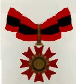 Orde van Verdienste van de Congo